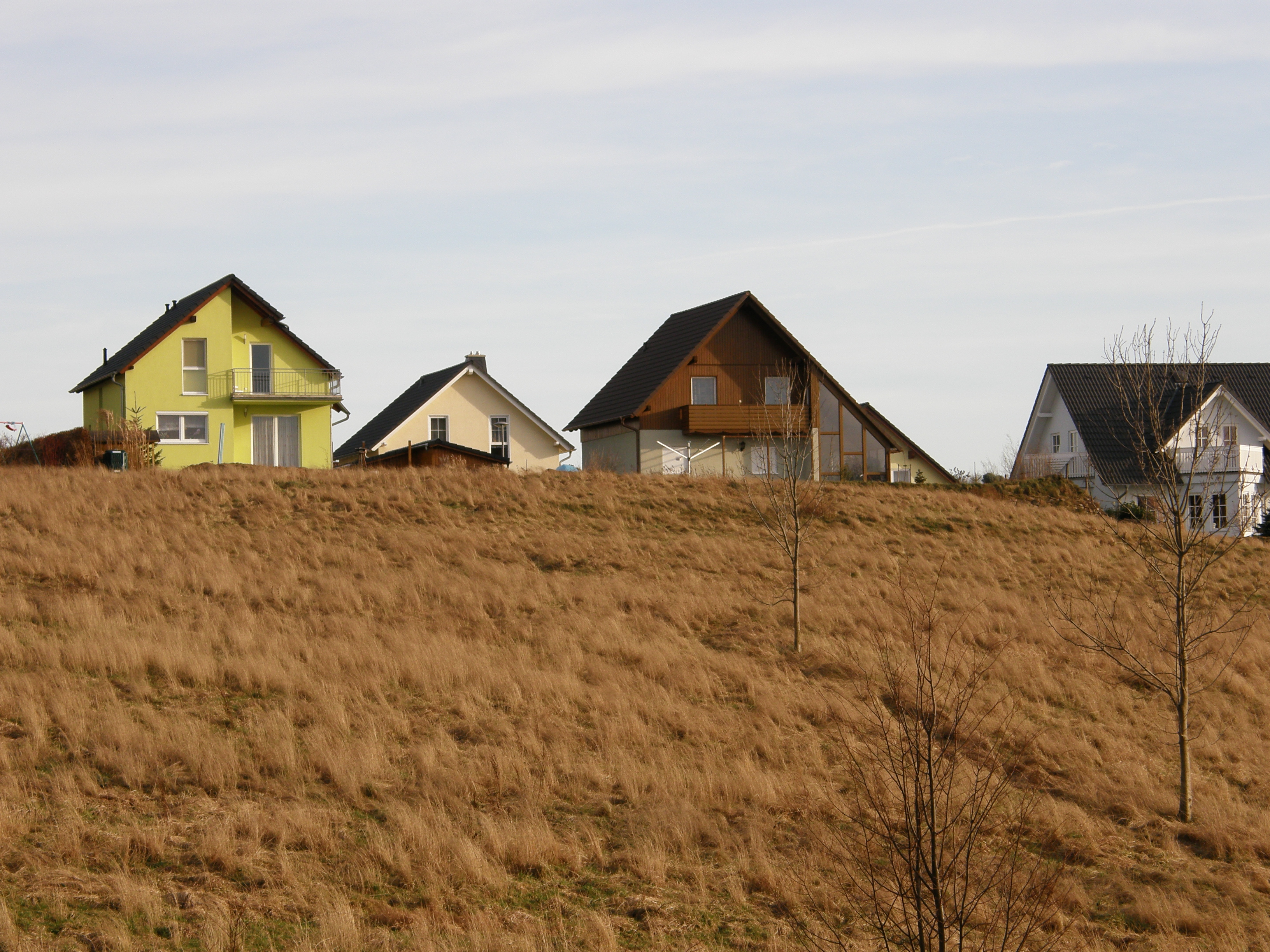 Frankenberg/Sa., Siedlungshäuser im Ortsteil Mühlbach